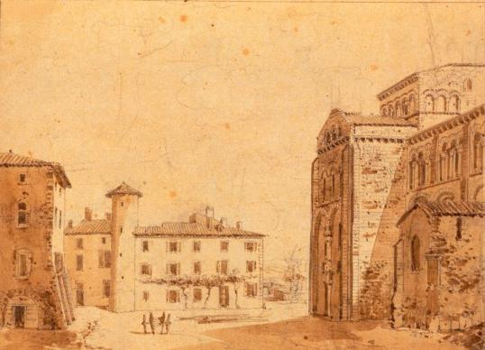 place de l'église Saint Austremoine en 1825. Image BNF (gallica.bnf)